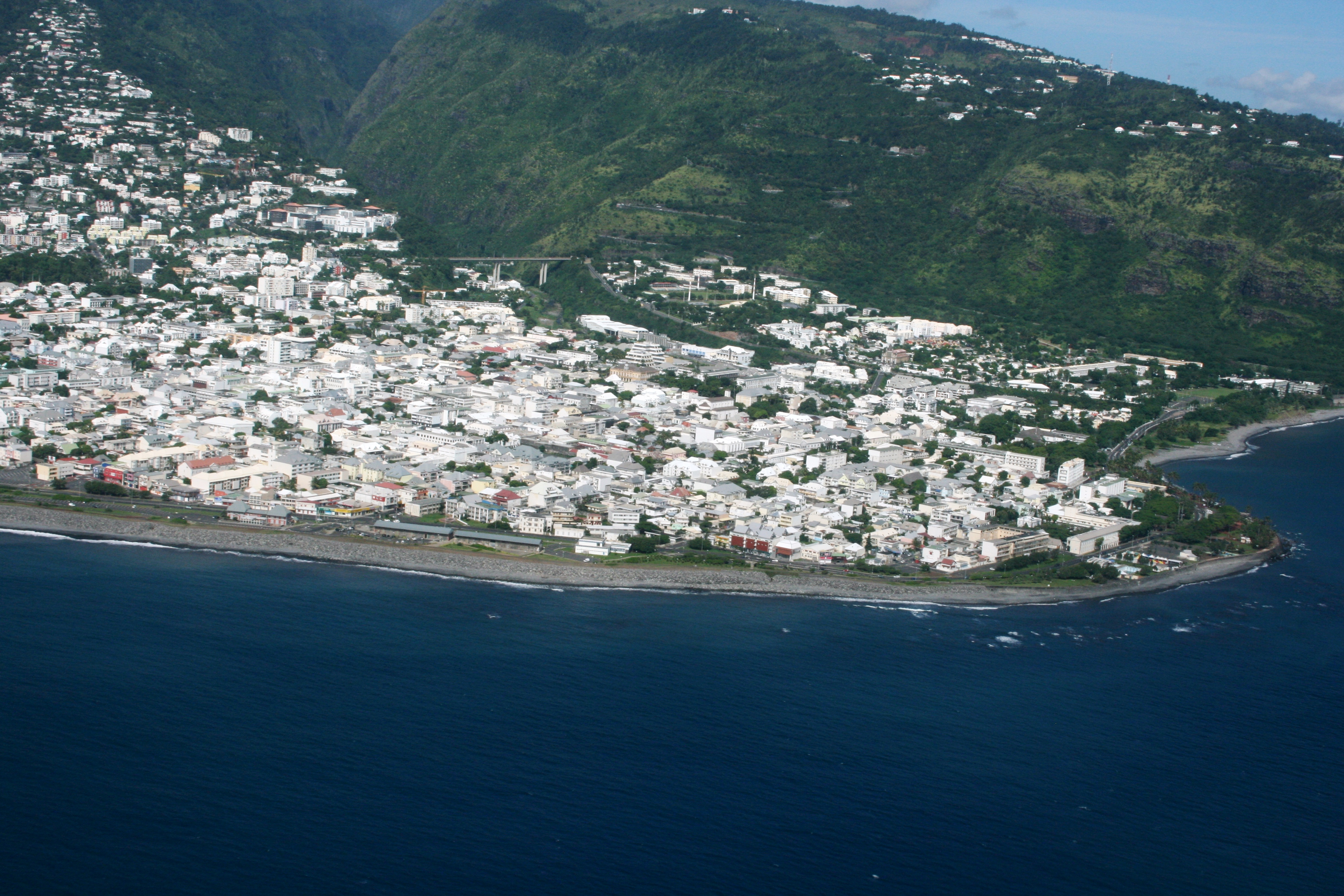 Vue du centre-ville de Sainte-Suzanne de La Réunion depuis un avion.